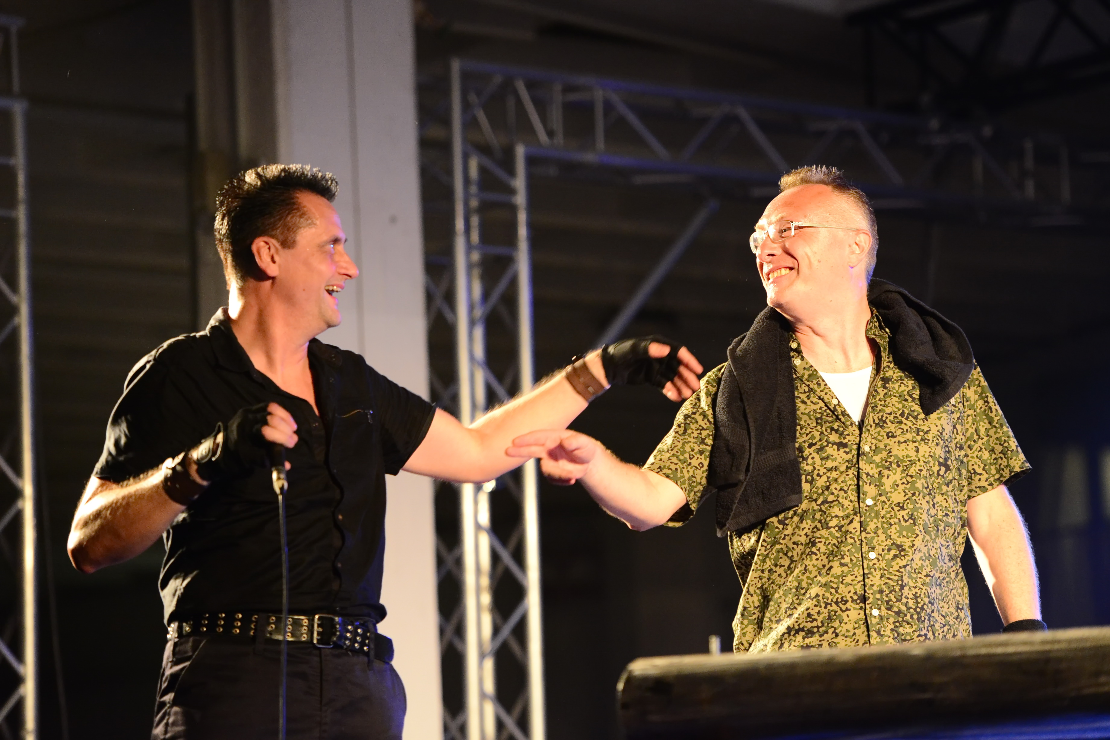 Die Krupps, Amphi festival 2014